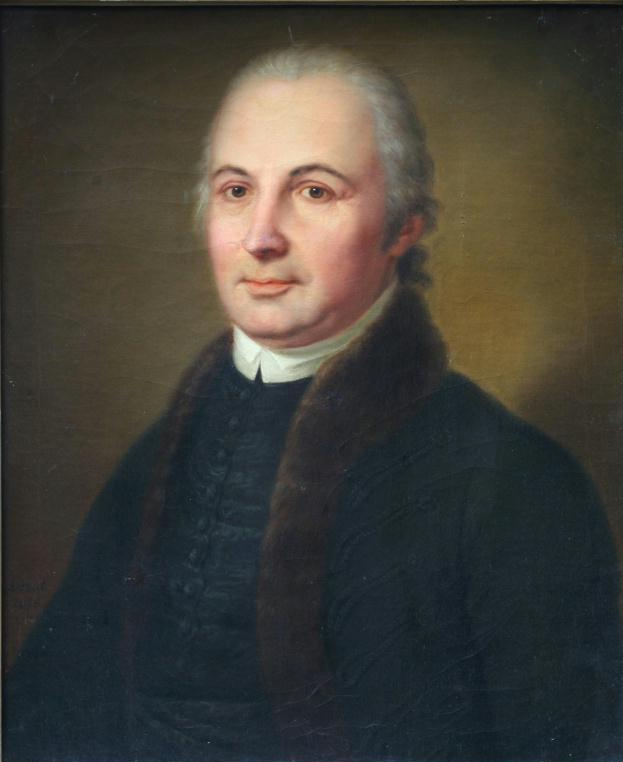 Virág Benedek tanár, költő, műfordító, történetíró.